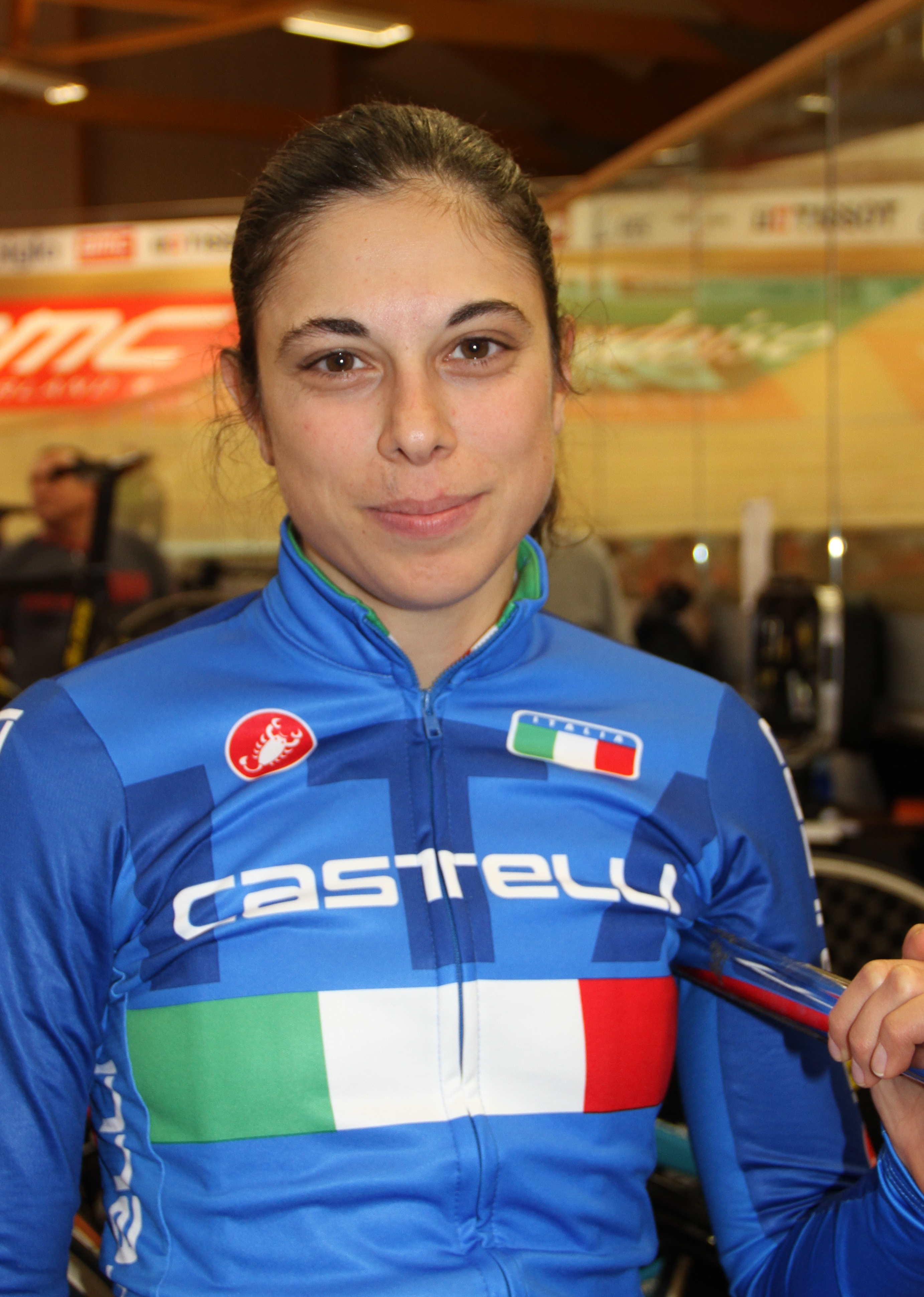 Annalisa Cucinotta, italienische Radsportlerin The making of this document was supported by the Community-Budget of Wikimedia Germany.